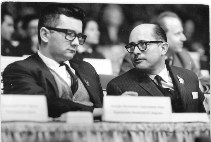 Zentralbild Kollektiv Me-At 15.1.1963 VI. Parteitag der SED vom 15.-21.1.1963 in der Werner-Seelenbinder-Halle in Berlin (1.Tag) UBz: Im Präsidium (links) der Leiter der Kubanischen Delegation Dr. Armando Hart, Mitglied der Nationalen Leitung der Ori und (rechts) der Generalsekretär der KP Columbiens, Gilberto Viera.(Junge)